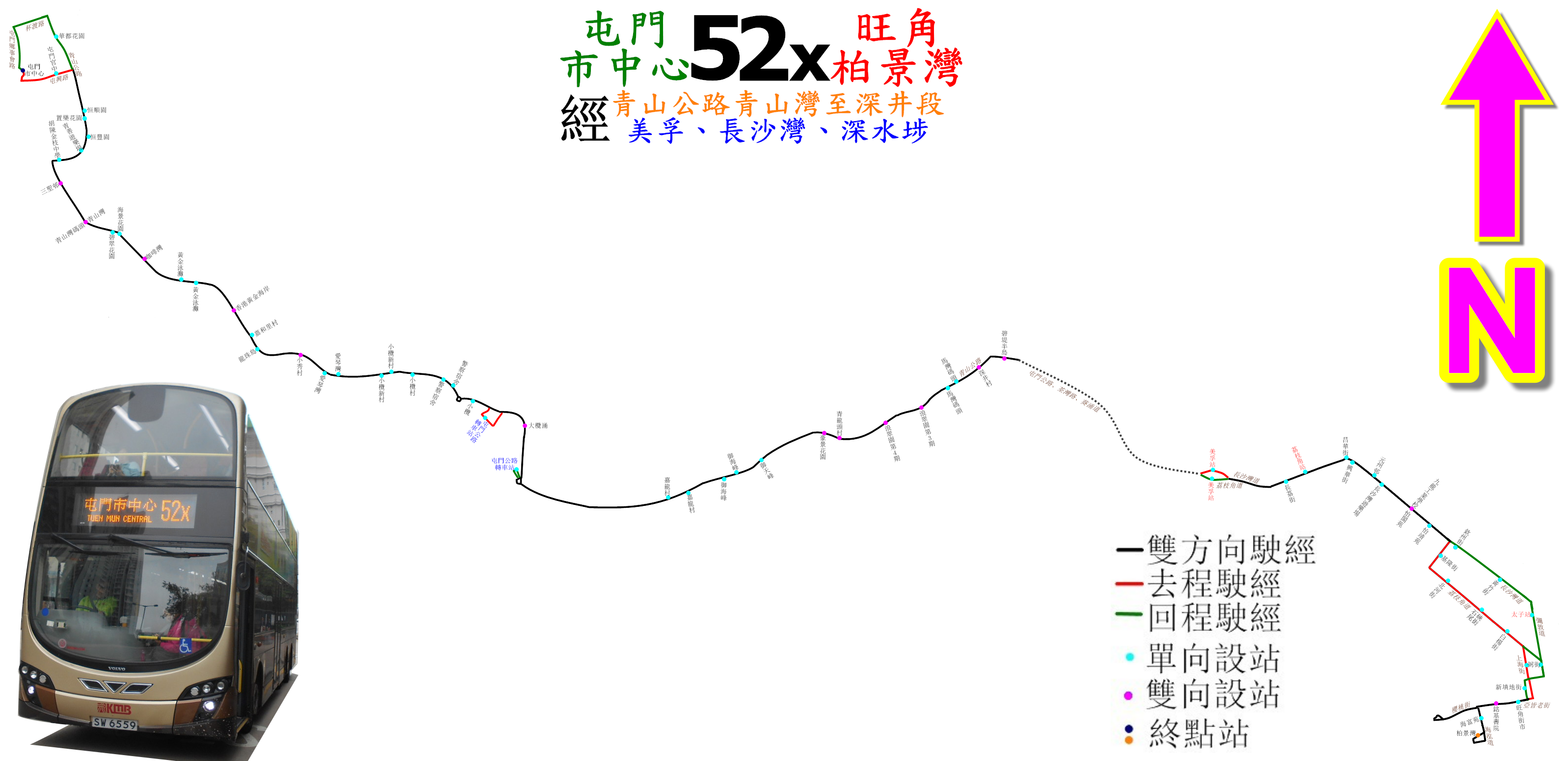 中文（香港）: 九巴52X線的走線圖